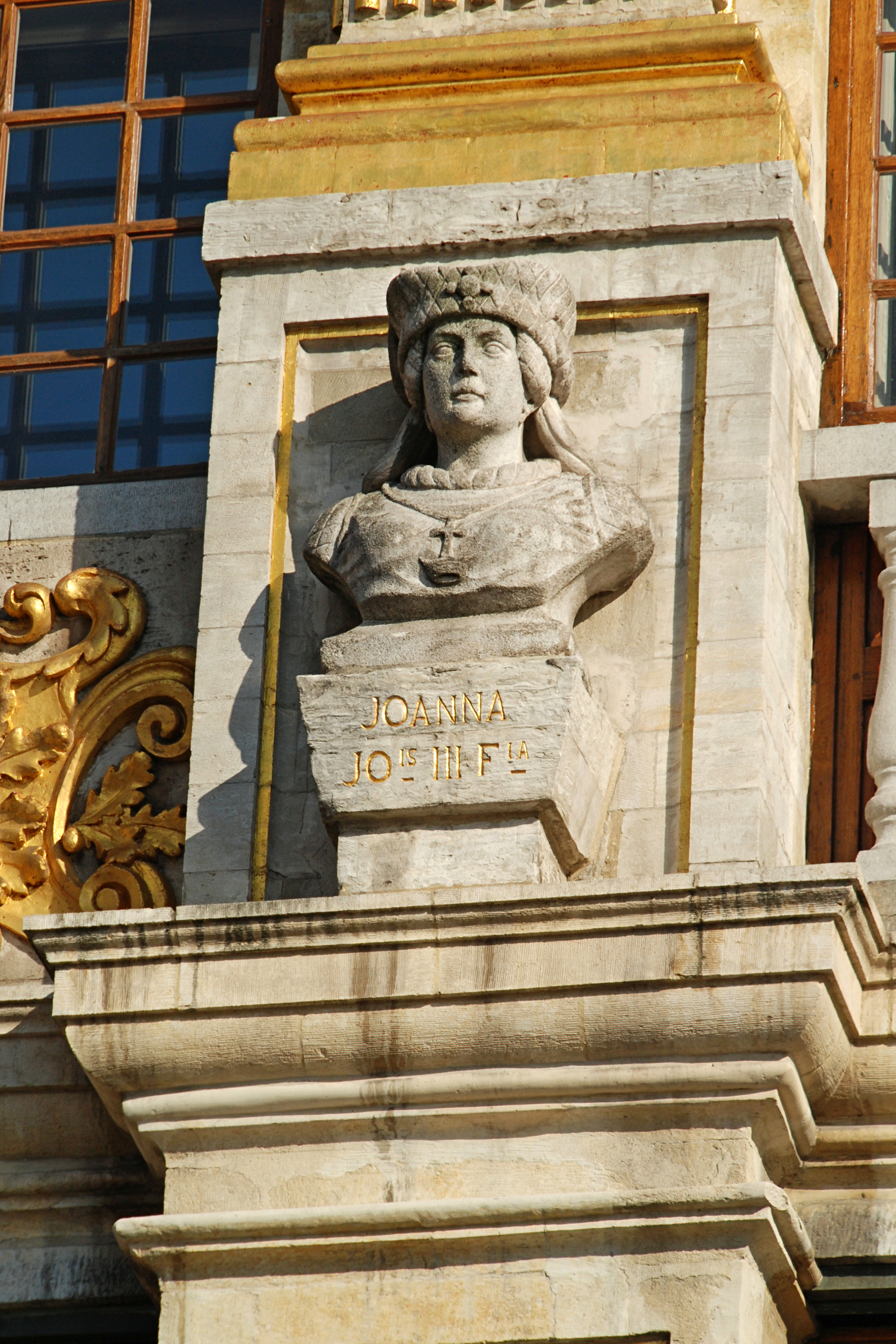 Belgique - Bruxelles - Grand-Place - Maison de la Colline - Buste de la Duchesse Jeanne de Brabant